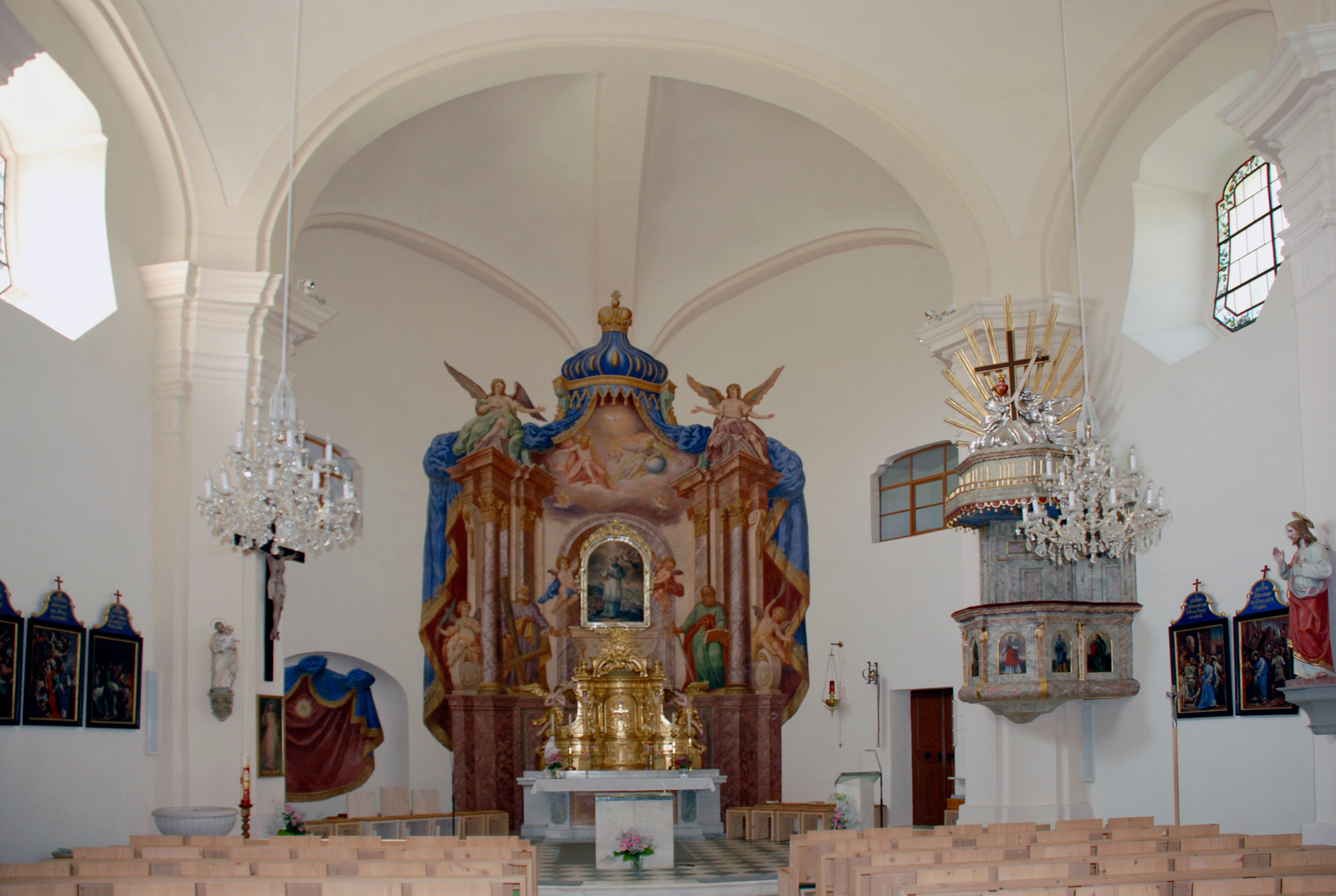 Hollenegg, Steiermark, Österreich: Patriziuskirche Innenansicht querformat